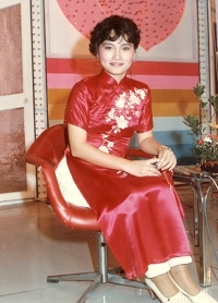 臺灣電視公司綜藝節目《我愛紅娘》主持人沈春華。